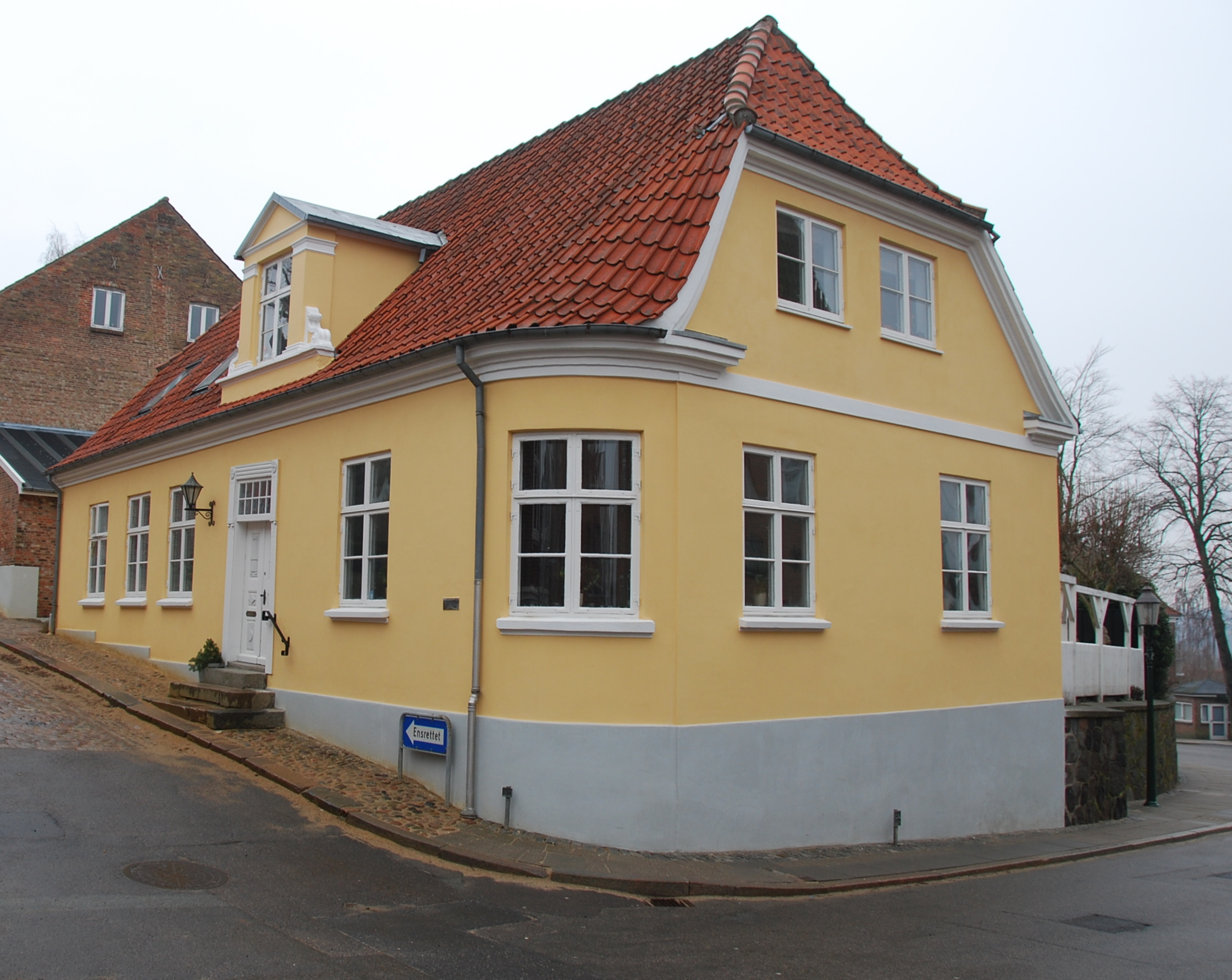 Den fredede bygning "Viborgs Middelalderlige Katedralskole" i Viborg.